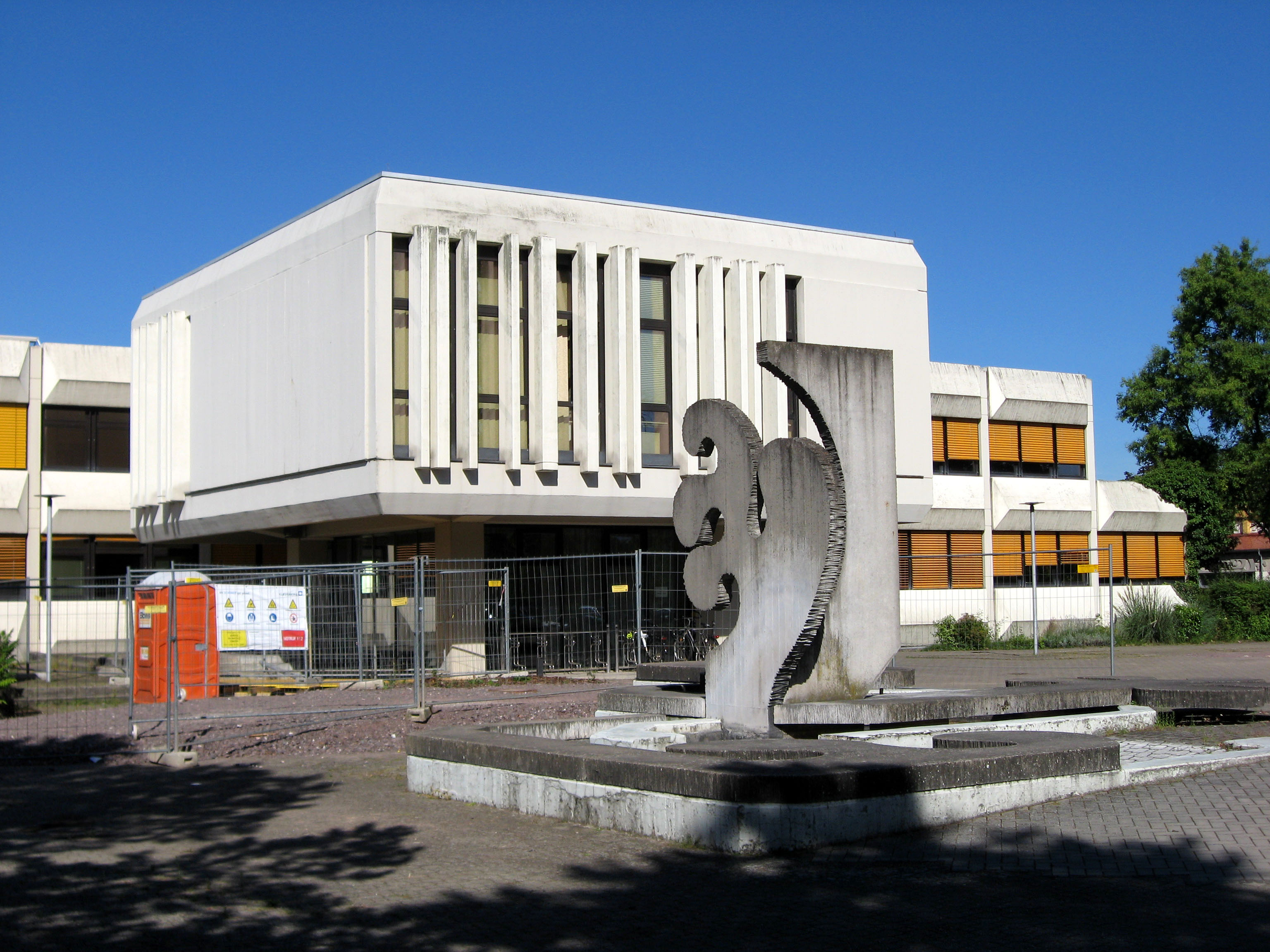 Rathaus der Verbandsgemeinde Offenbach/Queich, mit Kunst am Bau